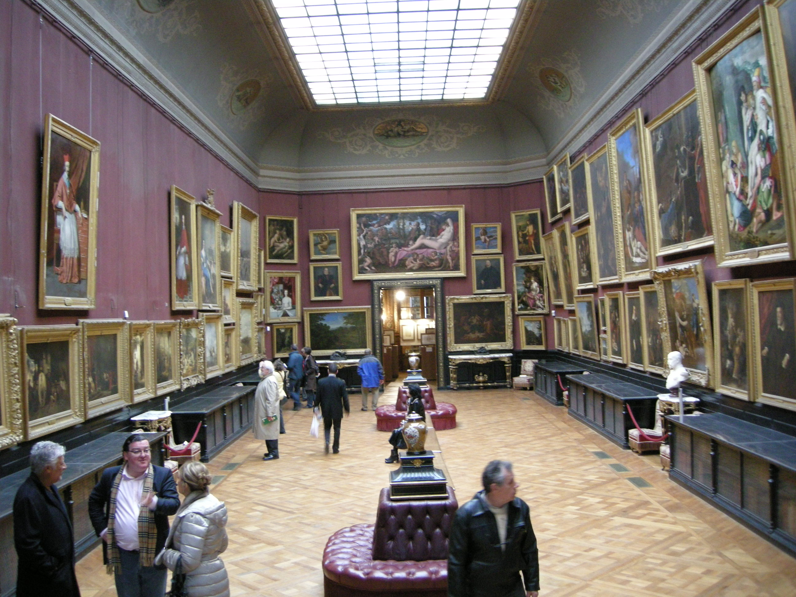 Museo condé, galleria